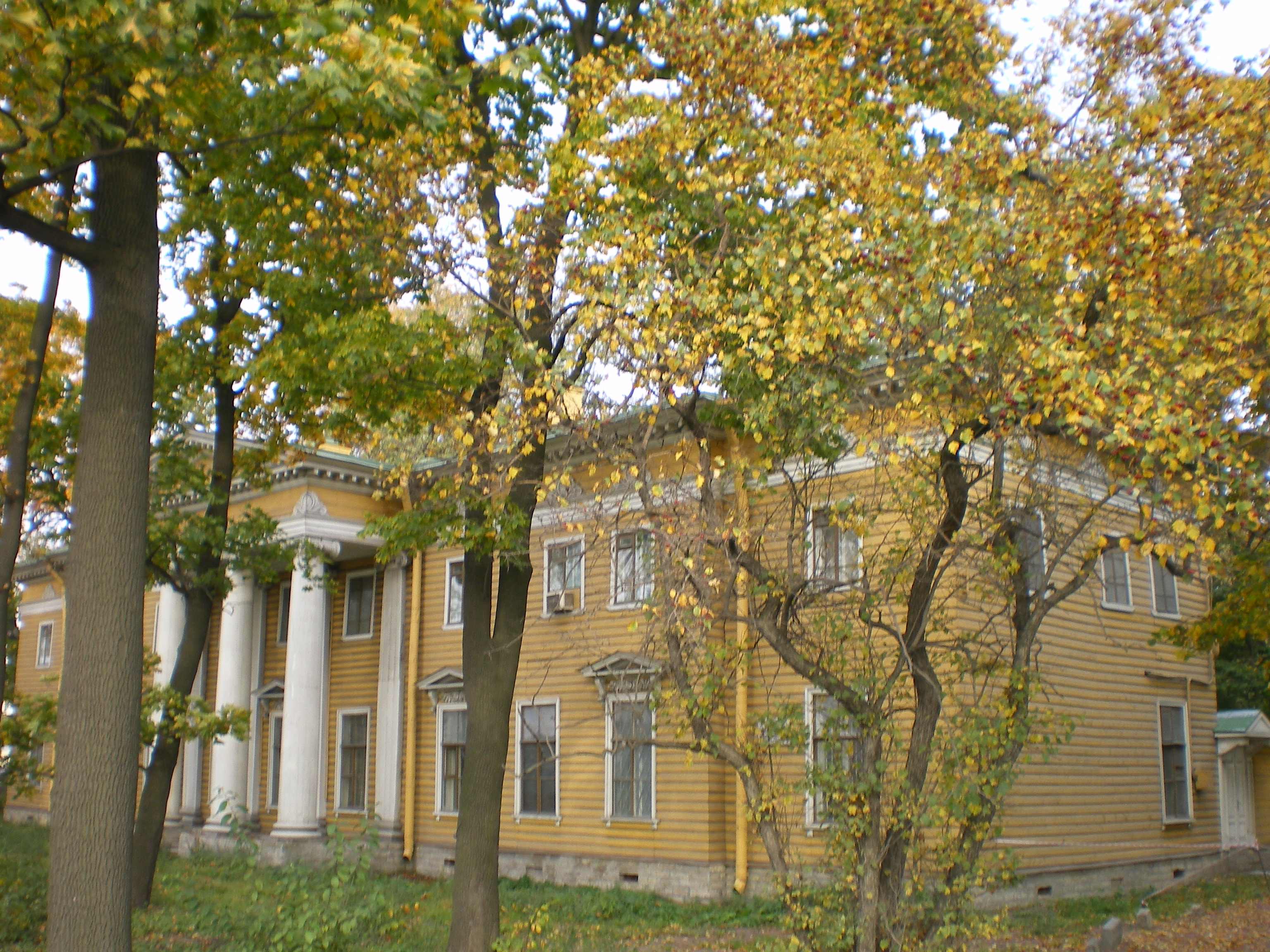 Здание Дачи Головина (Выборгская набережная).